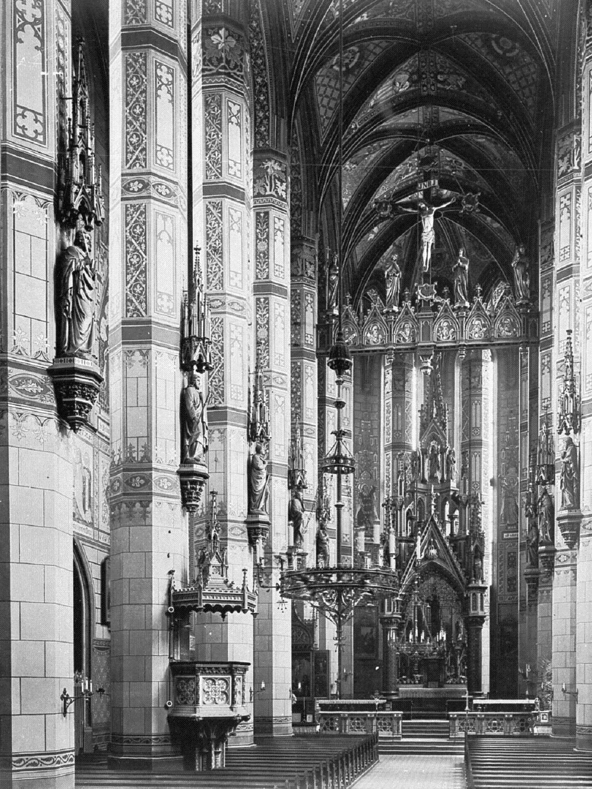 Neogotycki wystrój wnętrza kościoła św. Jakuba i św. Agnieszki w Nysie